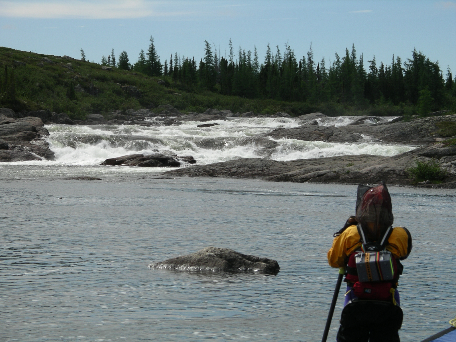 Cascades des chutes de Burin sur la rivière Charpentier au Québec. La rivière Charpentier est un cours d'eau qui coule dans la région du Nunavik dans la région Nord-du-Québec.